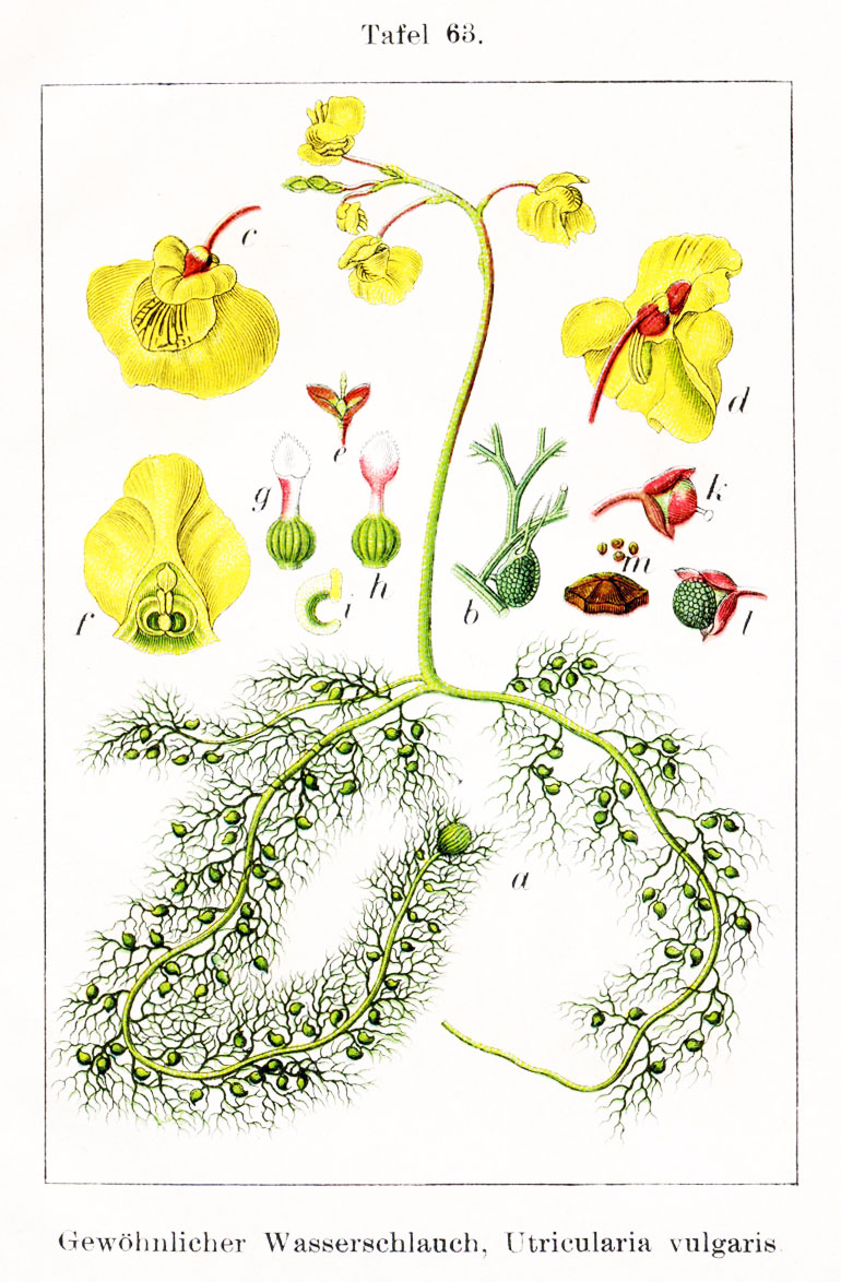 Fig. from book